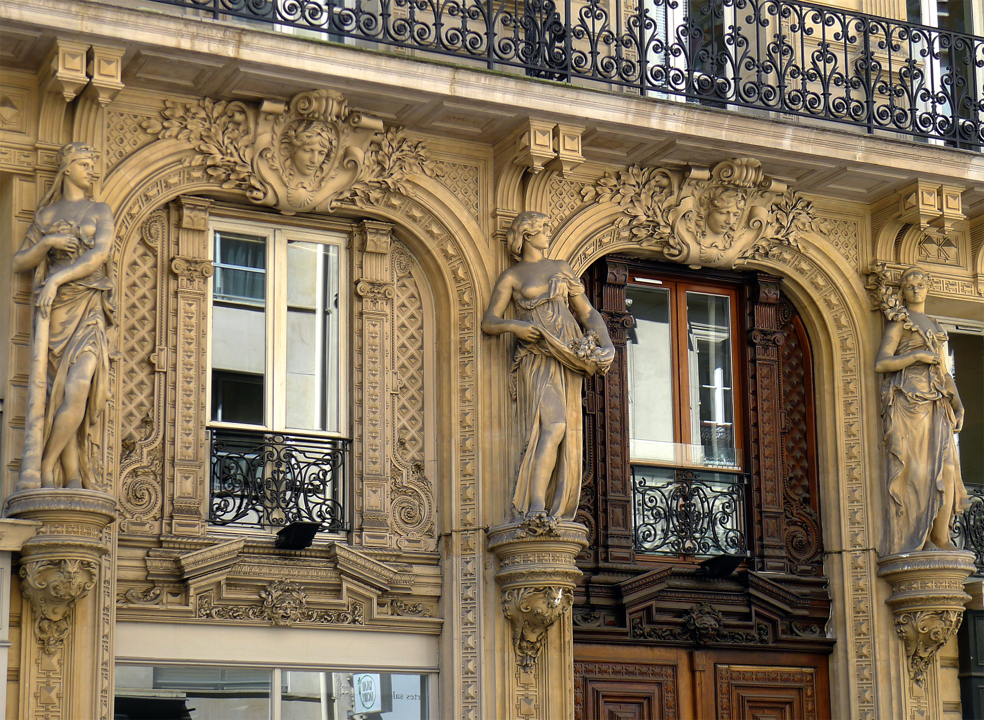 Rue de Miromesnil (n° 51 et 51bis) - Paris VIII Façade Second Empire. Les statues sont celles de "la Force" (avec une massue), "l'Abondance" (avec des fruits), "la Paix" (avec une branche d'olivier).